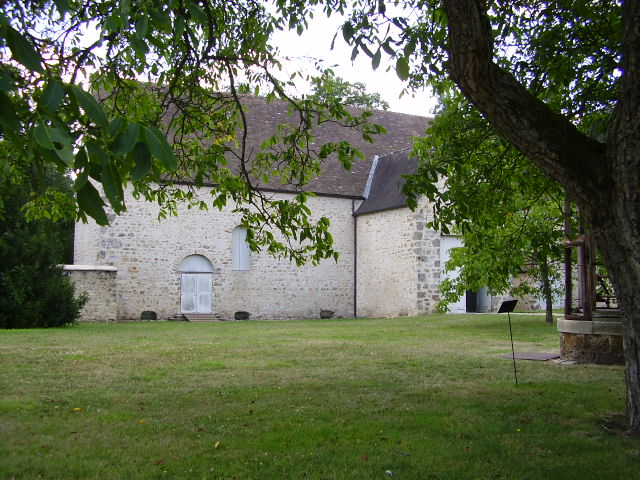 Granges et puits de Pascal, Port-Royal-des-Champs